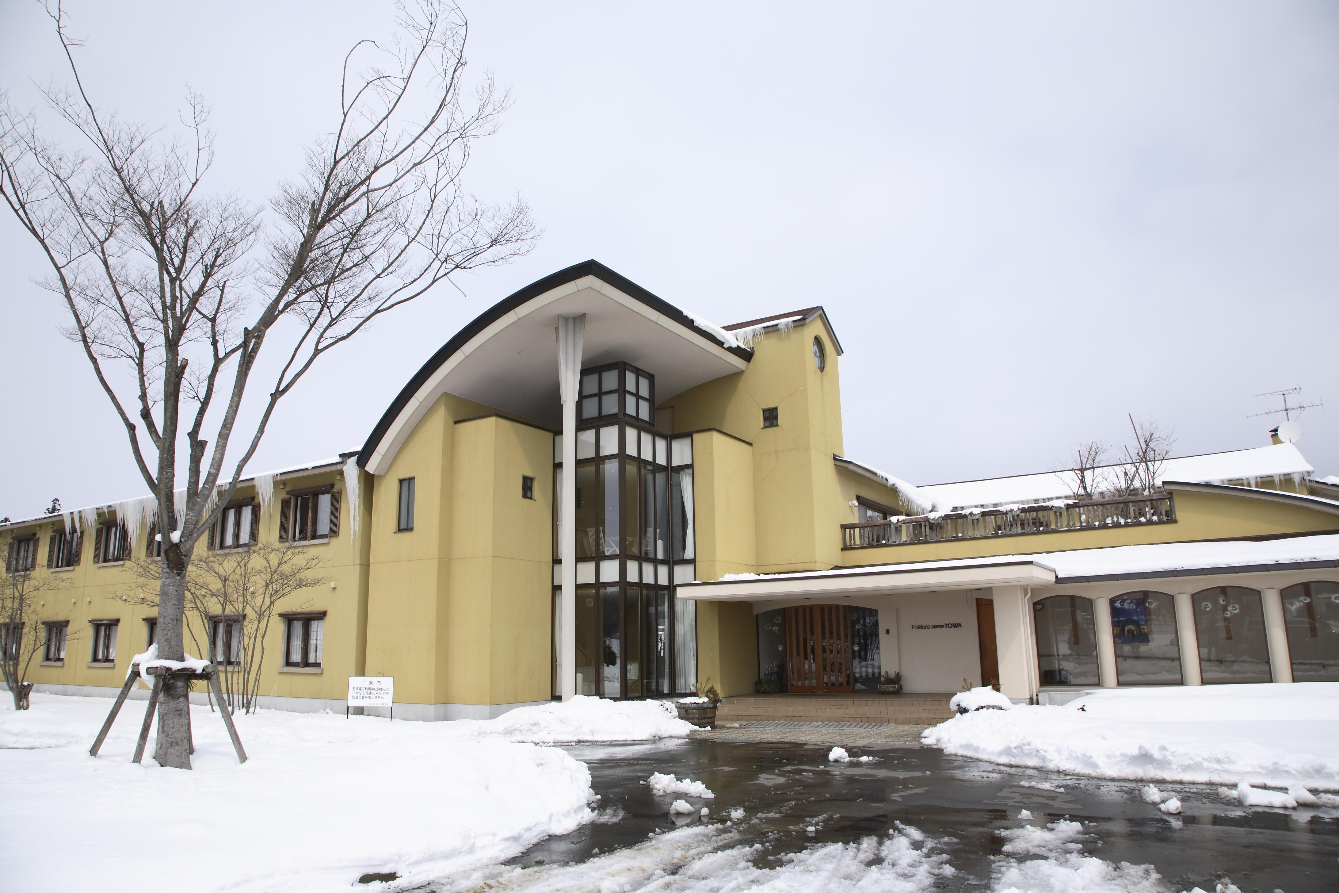 フォルクローロいわて東和の外観写真です。